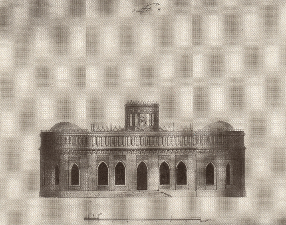 Фасад Третьего Кавалерского корпуса. (Царицыно)